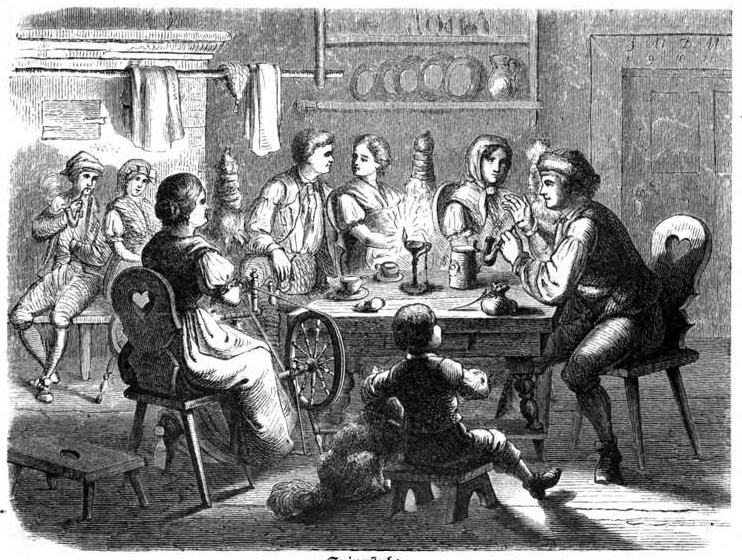 Spinnstube